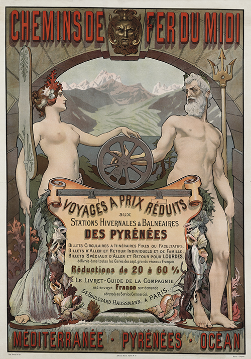 Plakat als Vielfarbdruck in den Maßen circa 104,1 x 73,2 cm, gedruckt von Manzi, Joyant & Cie, Paris, Typ. Goupil & Cie nach einem dem Künstler Paul-Adolphe Kauffmann zugeschriebenen Entwurf ...